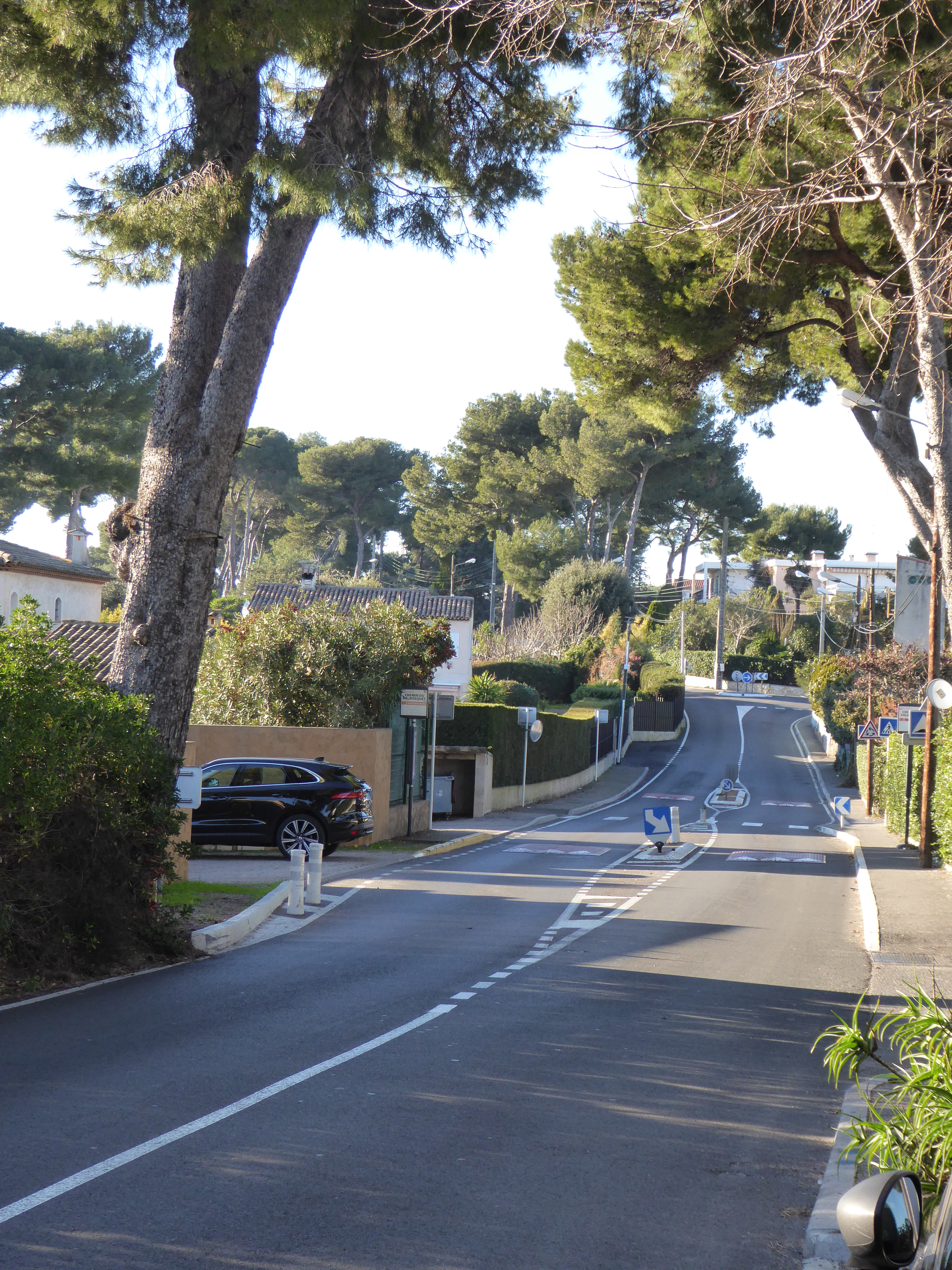 Chemin du Valbosquet